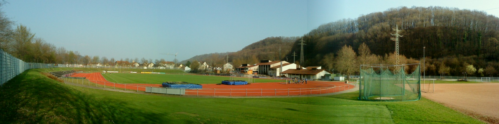 Wiesentalstadion, im Hintergrund rechts die Wiesentalhalle (Veranstaltungshalle), im Steinemer Ortsteil Höllstein